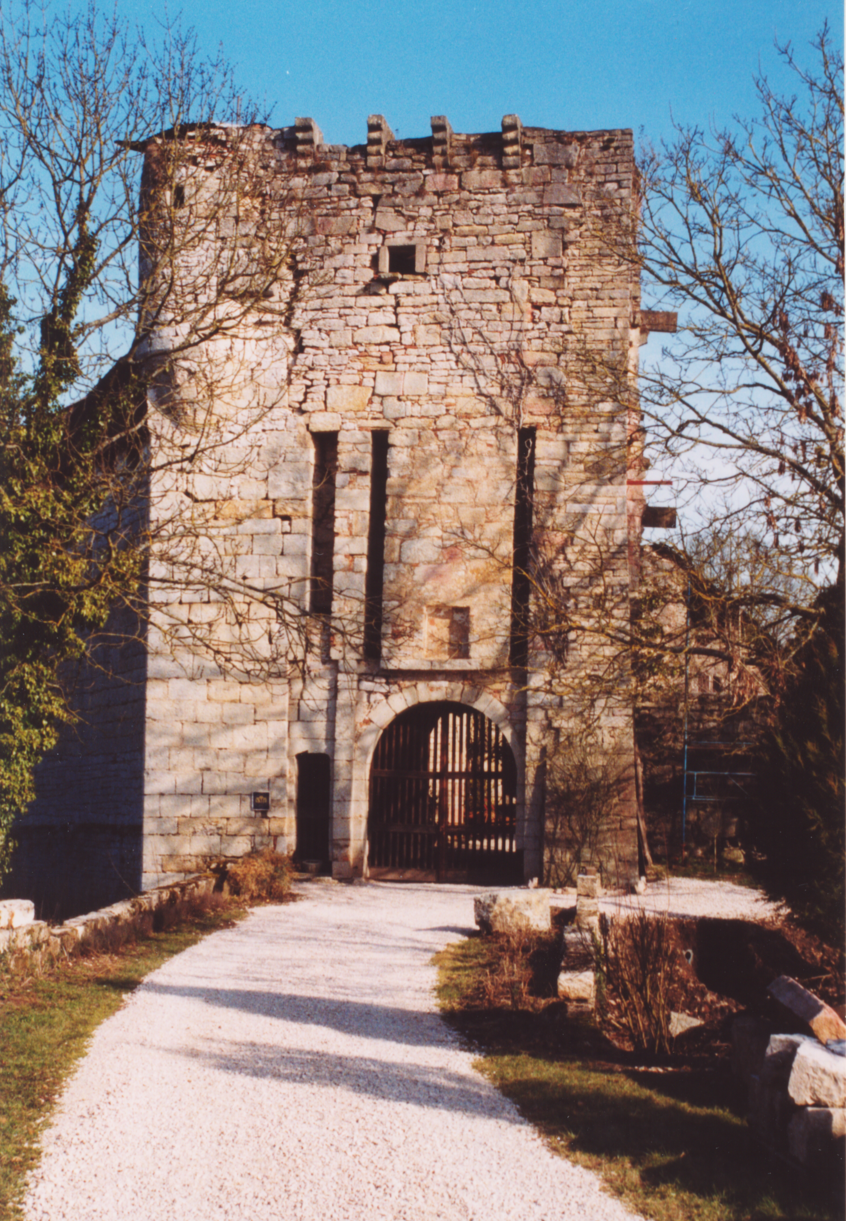 Le château médiéval de Chevigny (Jura), France, Franche-Comté